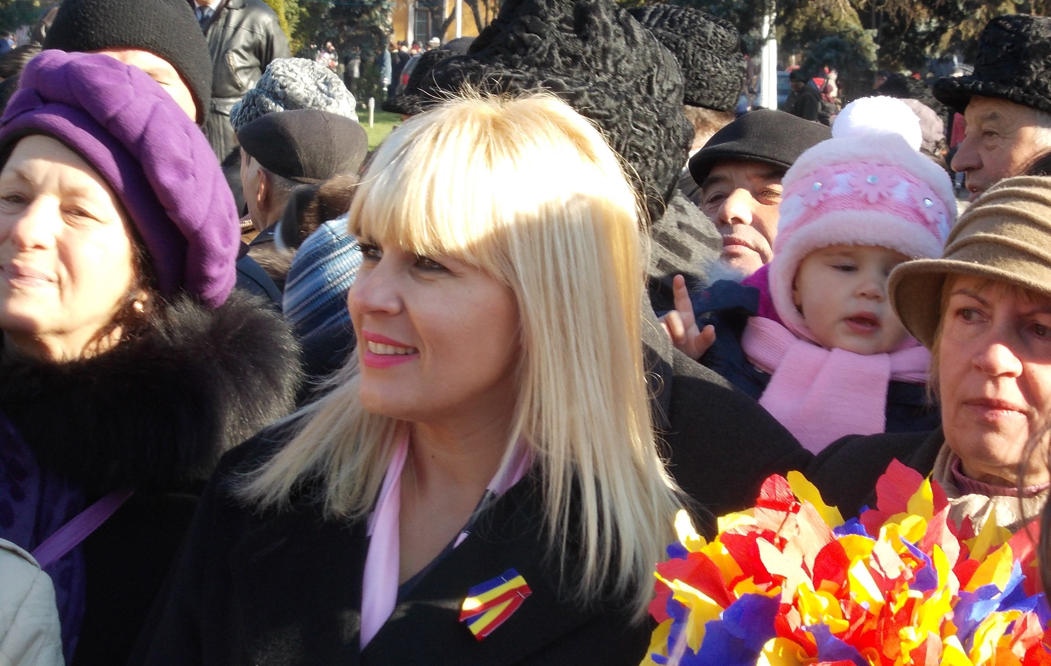 Elena Udrea la Roman cu ocazia Zilei Naţionale